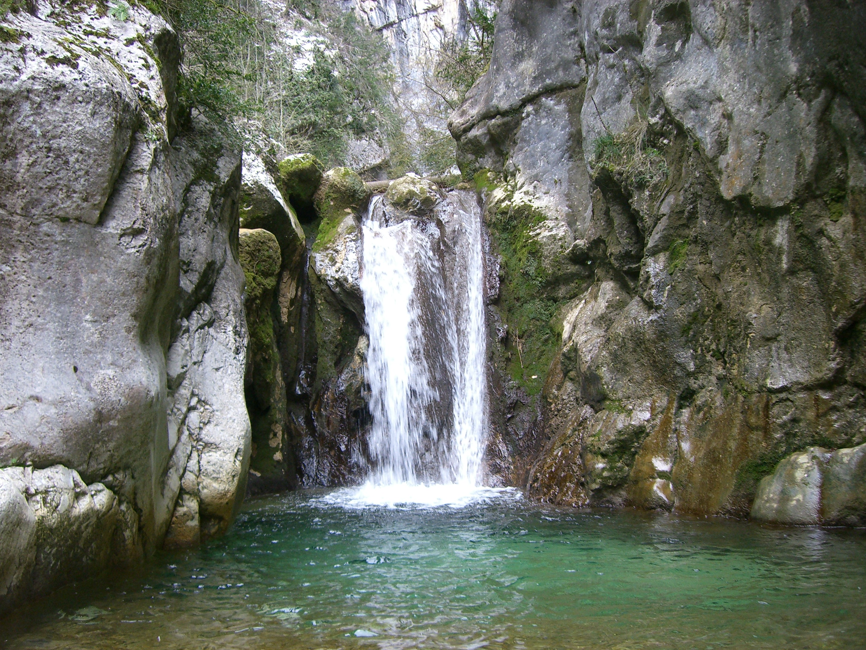 Une cascade près de Cognin-les-Gorges.